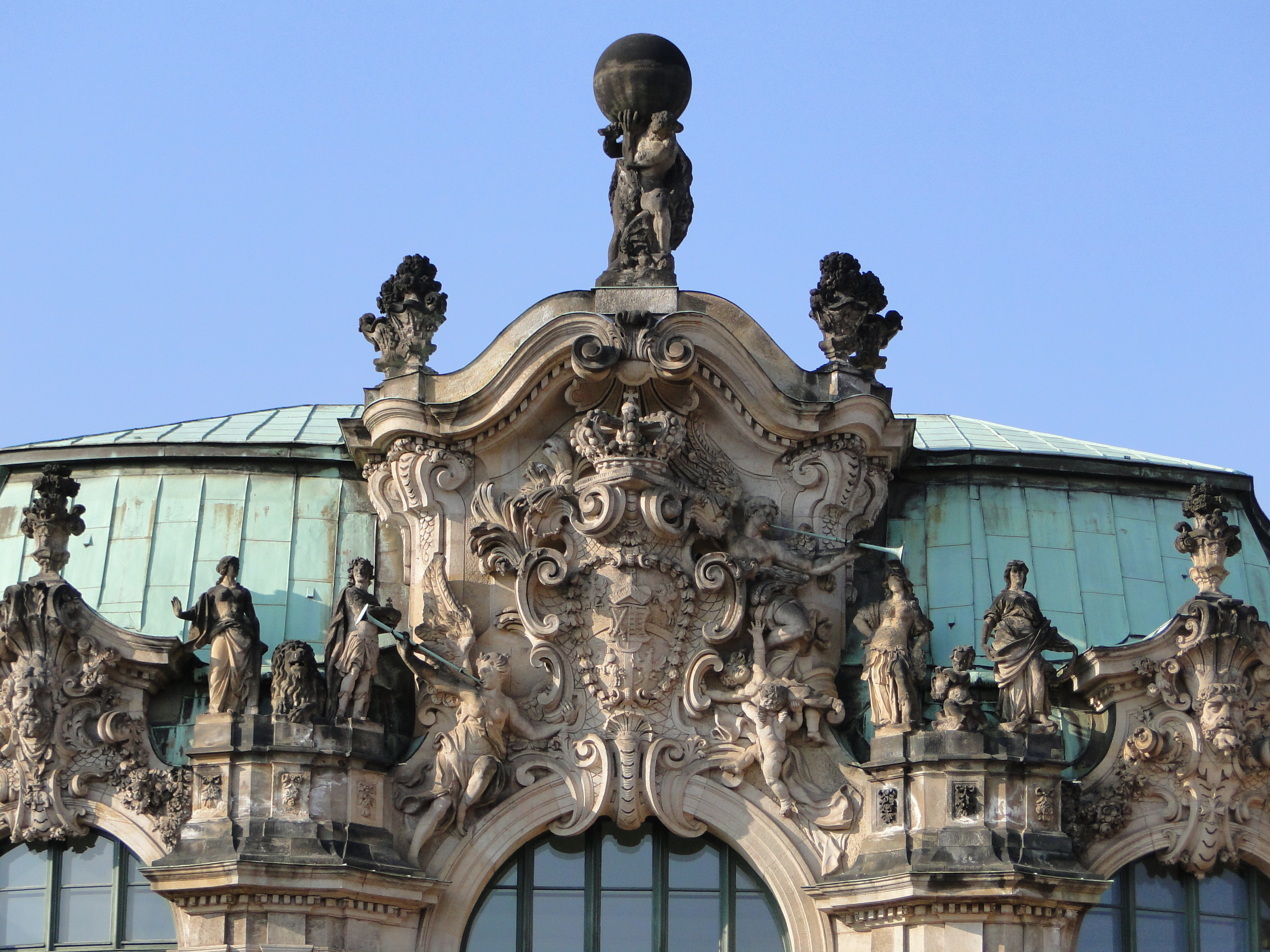 Zwinger, Wallpavillon Detail